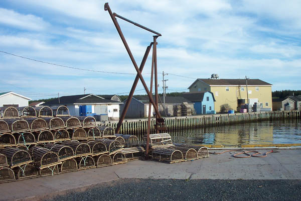 August 10, 2007